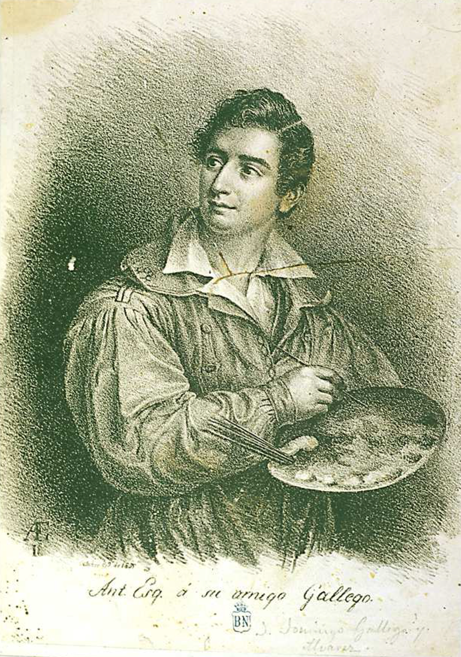 Retrato de Domingo Gallego y Álvarez.